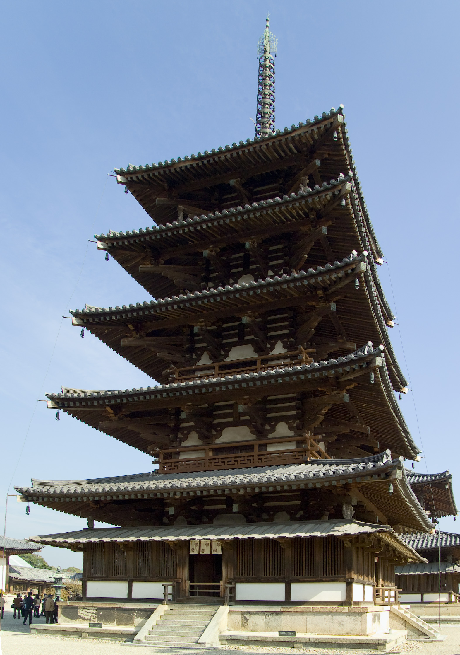 Hōryū-ji 法隆寺 Ikaruga Nara Prefecture Japan 奈良県生駒郡斑鳩町